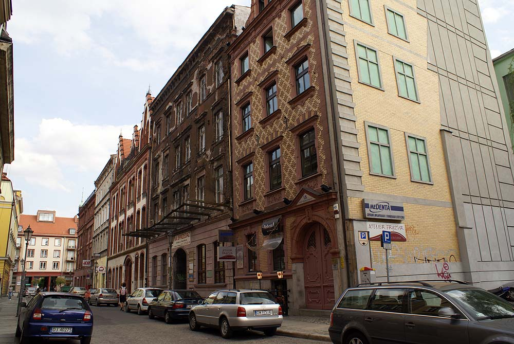 Kamienica Ofiar Oświęcimskich 15, Miasto Wrocław - Stare Miasto